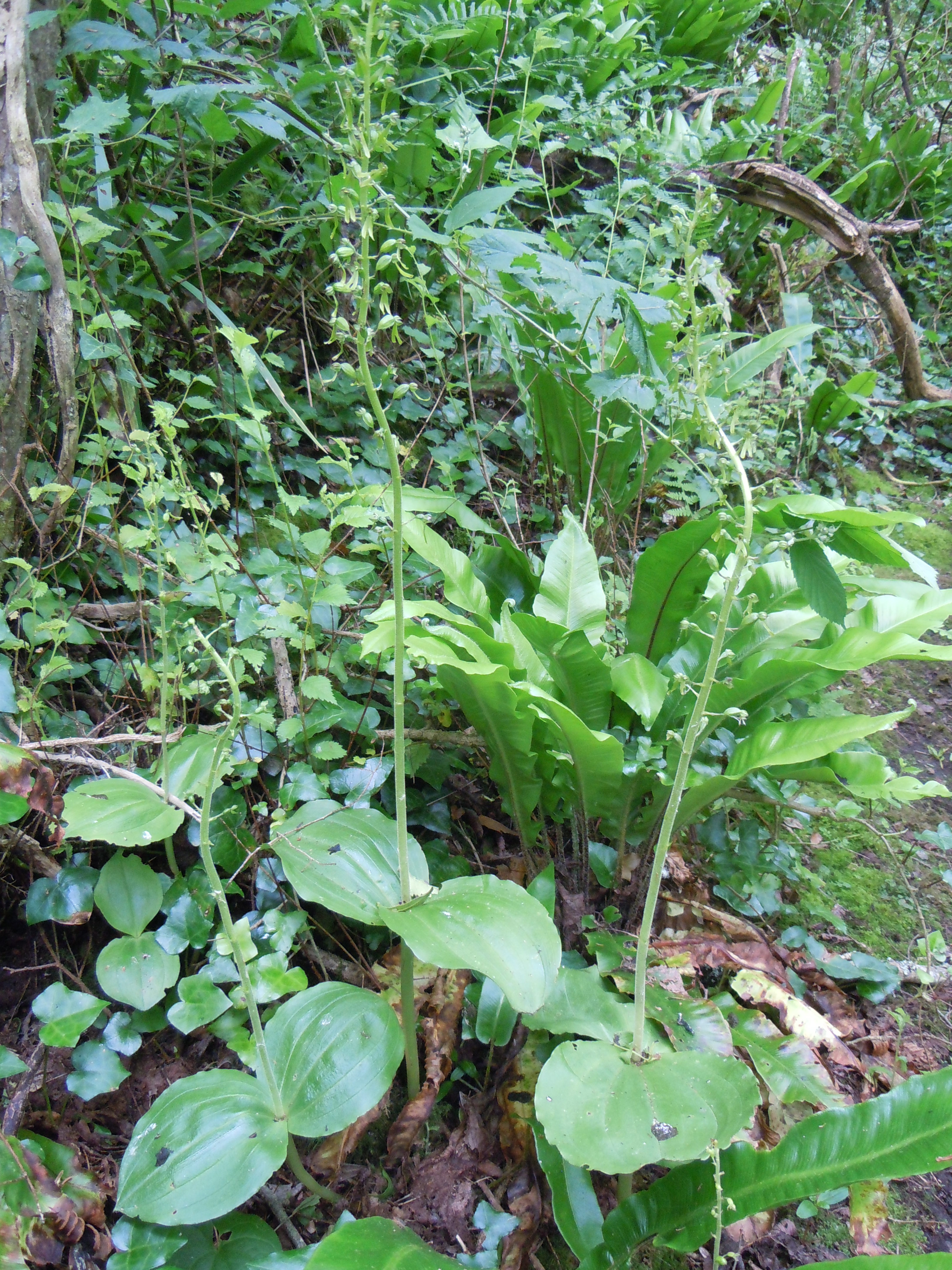 Neottia ovata, Vallon Nord de Port-Maria, Ormaie de ravins à Scolopendres ( Asplenium scolopendrium), Locmaria, Belle-Île-en-Mer